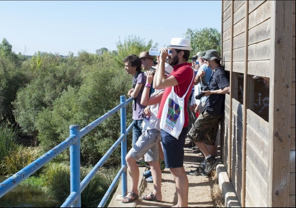 Birdumo en Azud de Badajoz